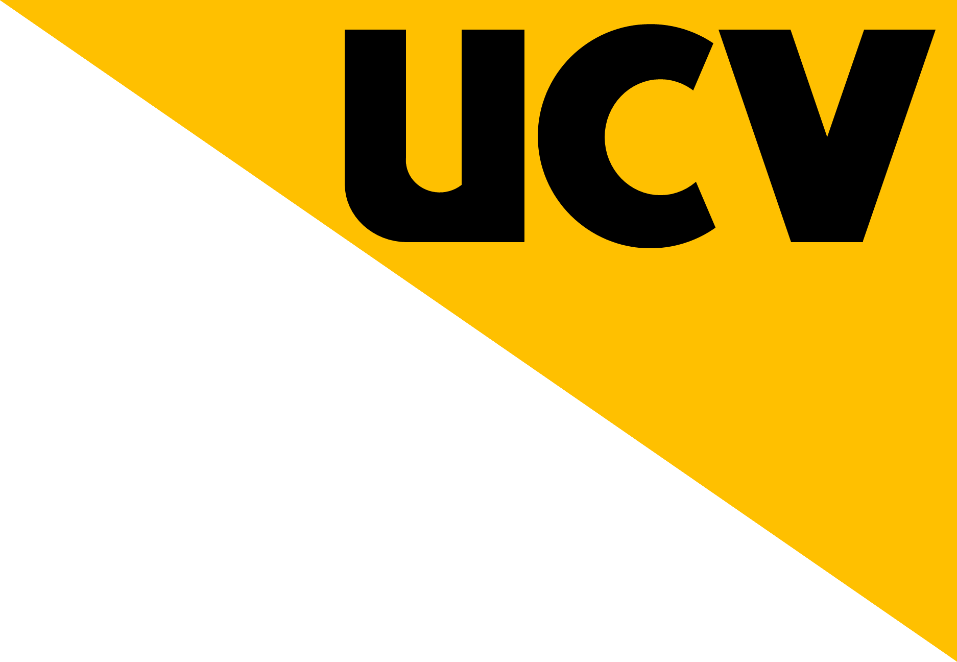 Logotipo de UCV TV 2014 según la Web del Canal.